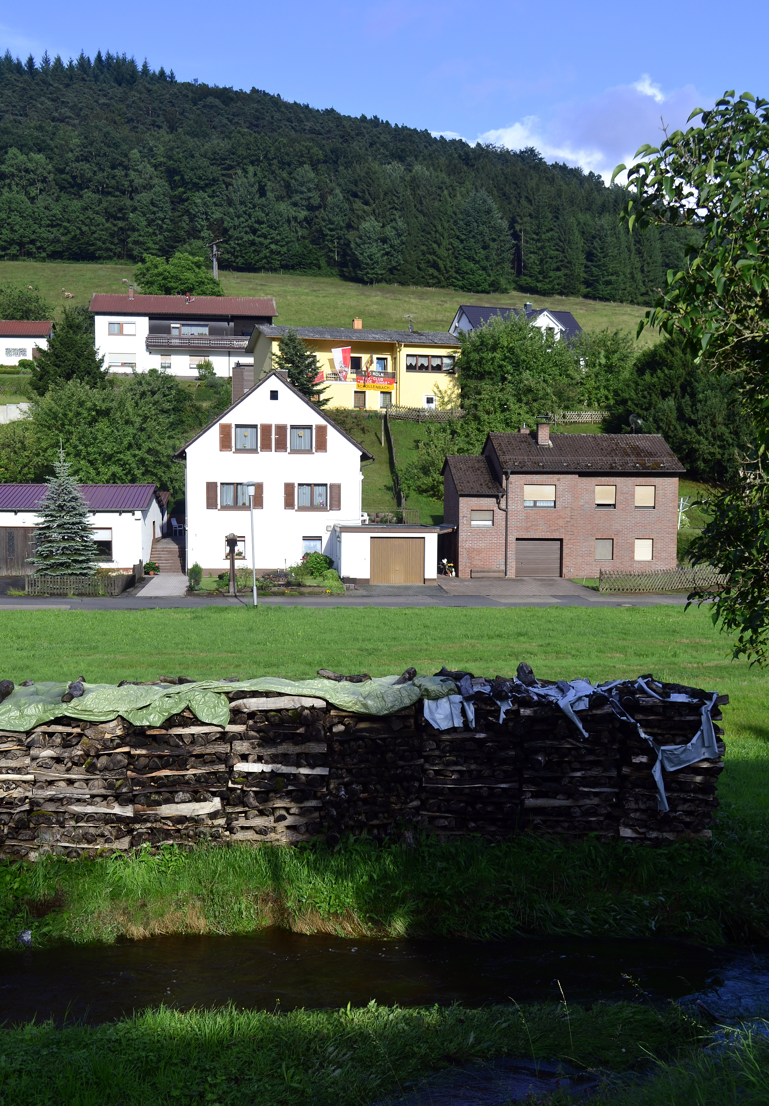 Blick auf Badisch Schöllenbach, Stadt Eberbach von Schöllenbach, Gemeinde Hesseneck aus.